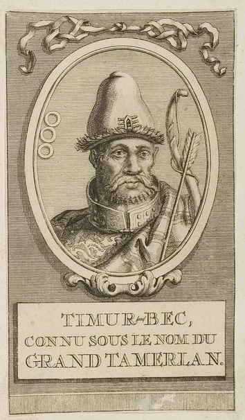 Grafik aus dem Klebeband Nr. 1 der Fürstlich Waldeckschen Hofbibliothek Arolsen Motiv: Tamerlan, zentralasiatischer Eroberer islamischen Glaubens am Ende des 14. Jahrhunderts